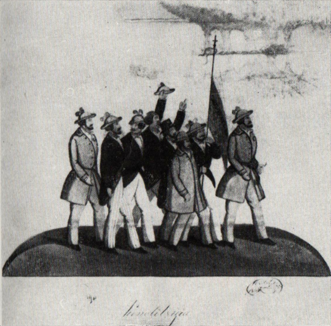 Grupul de manifestanți pentru revoluție la 1848 - acuarelă aflată astăzi la Cabinetul de Stampe al Academiei Române din București.